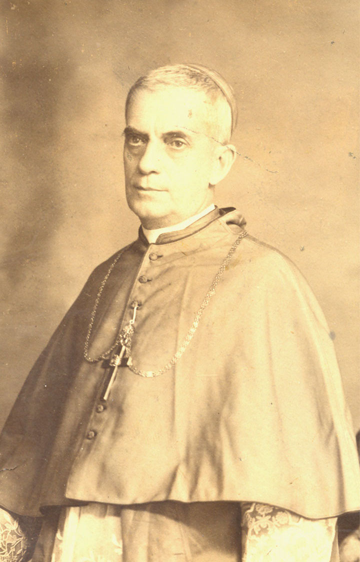 Monseñor Manuel José Cayzedo, Arzobispo de Medellín, en el periodo 1906-1937.